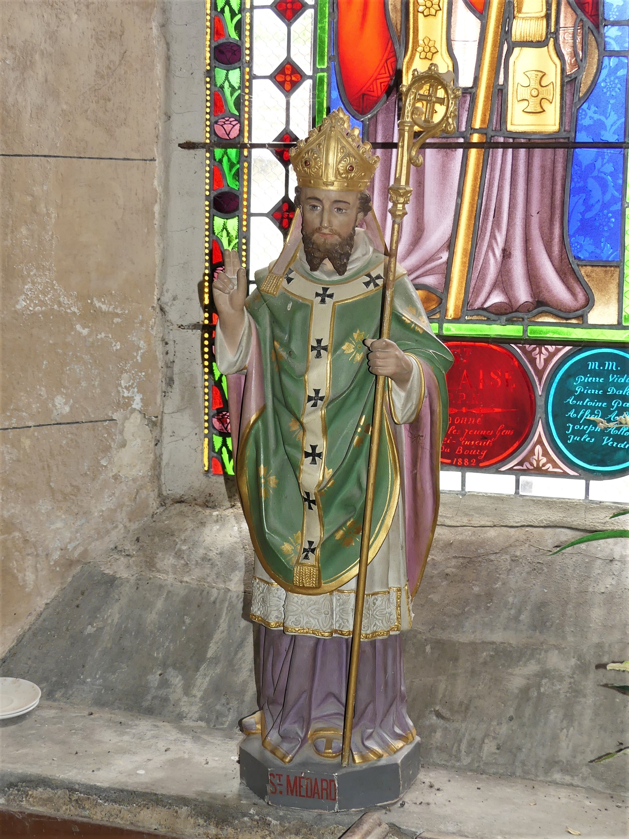 Statue représentant saint Médard, collatéral sud de l'église, Saint-Merd-la-Breuille, Creuse, France